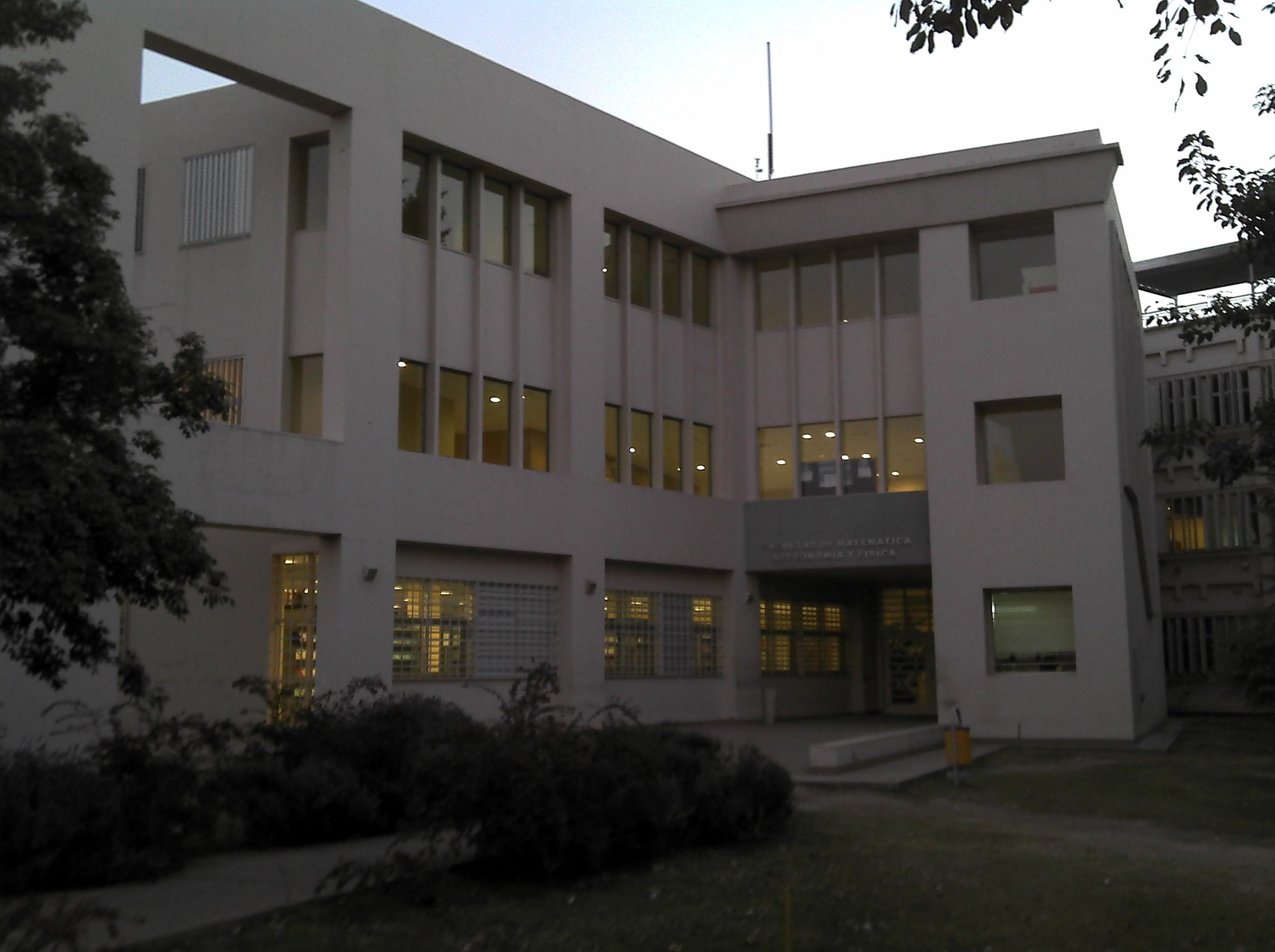 Edificio de la Facultad de Matemática, Astronomía y Física